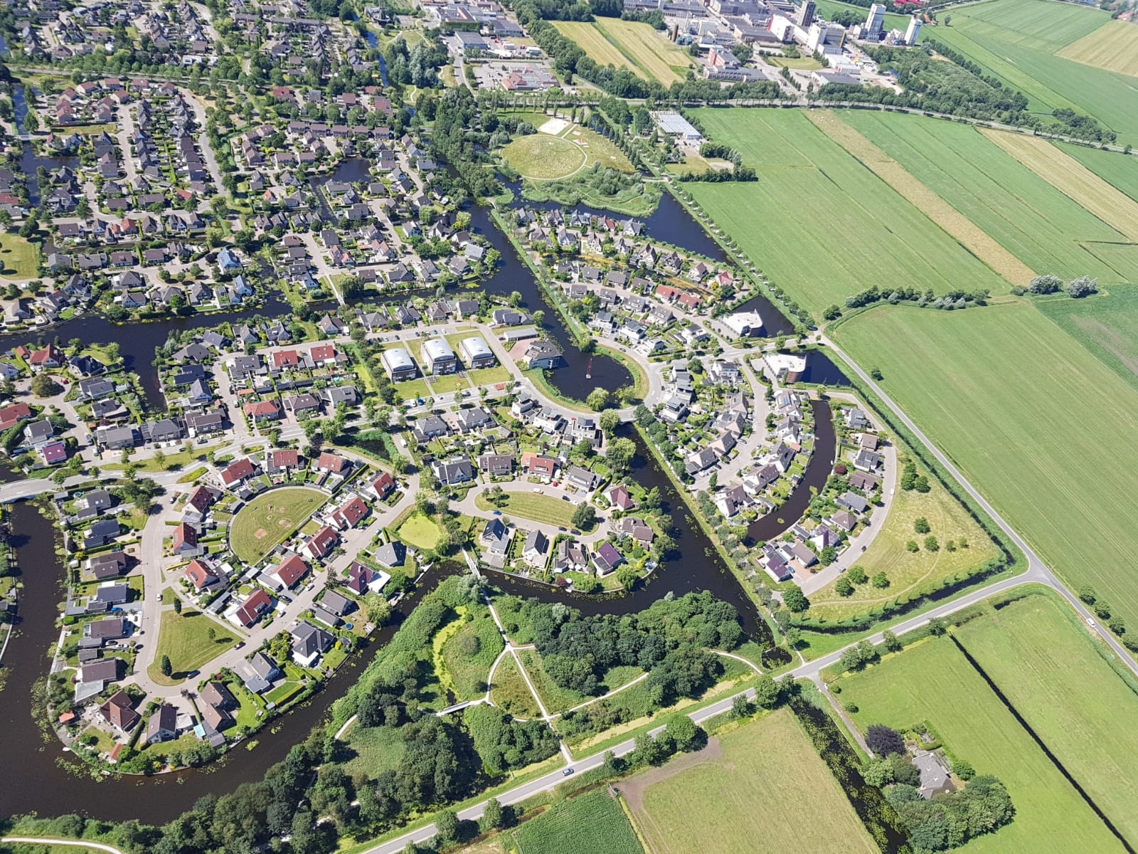 Noardlik diel fan de wyk Skipsleat op De Jouwer yn Fryslân út de helikopter sjoen. Rjochts de Vegelinswei, ûnder de Koarte Ekers.